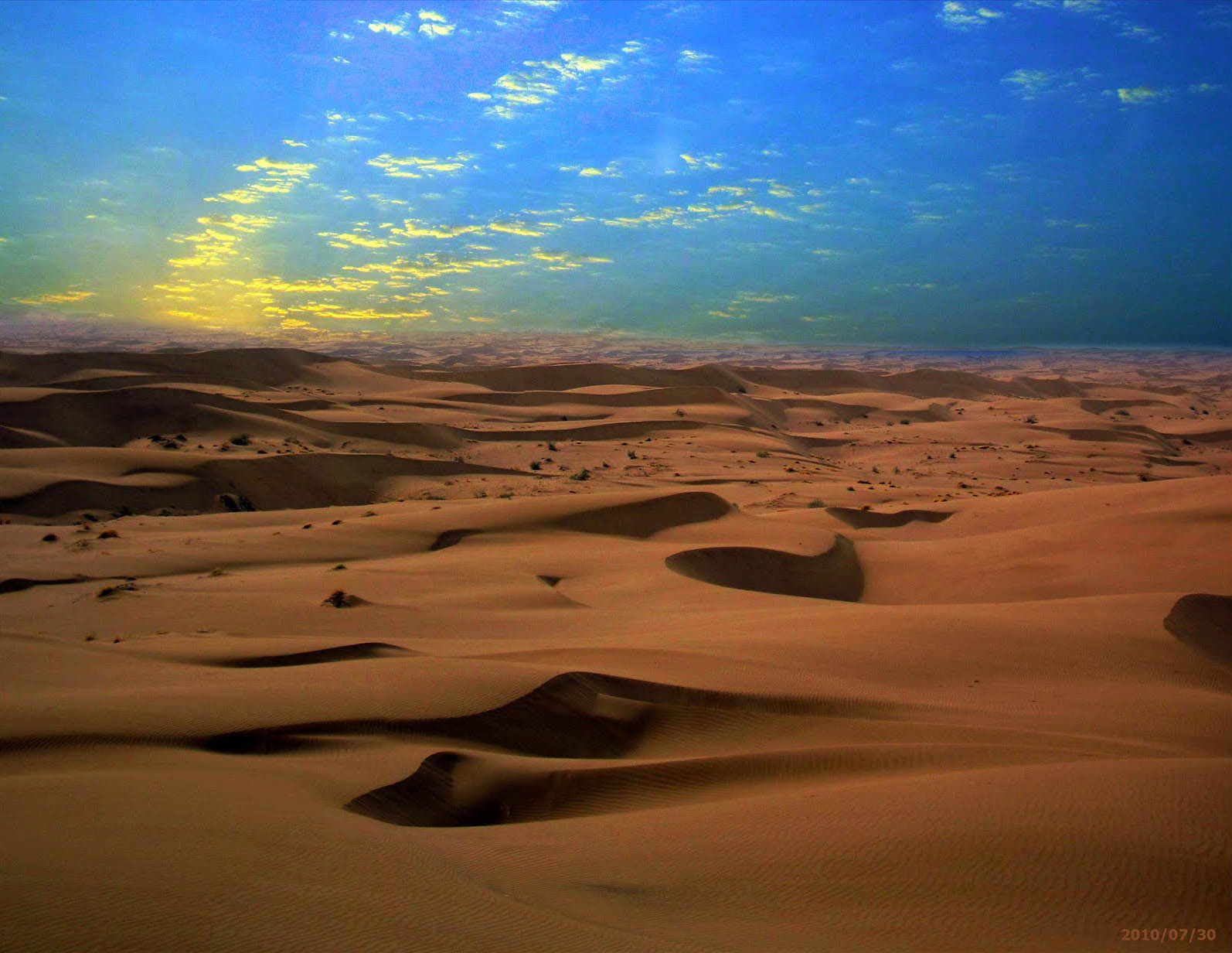 شن‌های روان کویر مرنجاب، پارک ملی کویر.